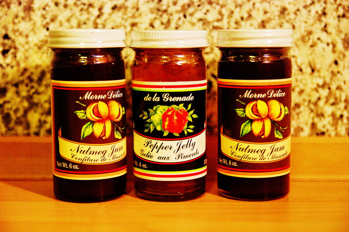 Leckere Reisemitbringsel: Marmelade aus Muskat, Gelee aus Pfeffer